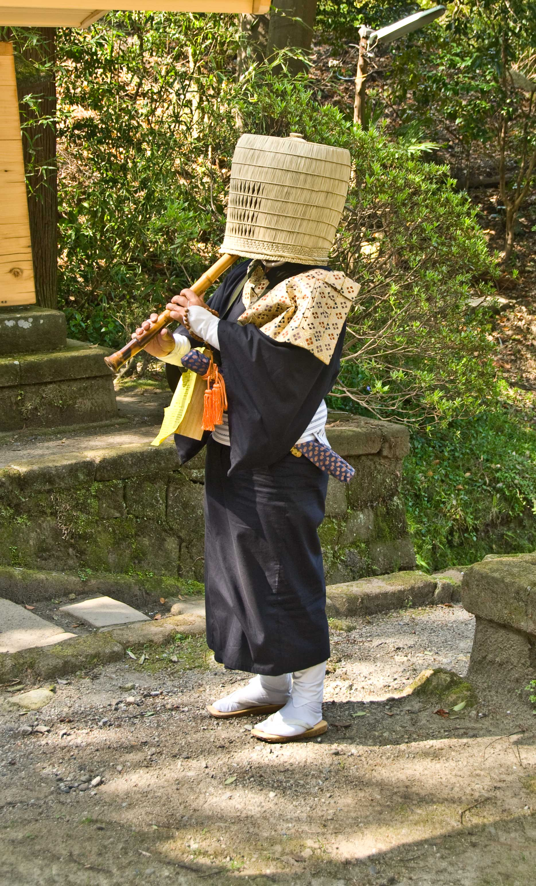 A Komuso, that is, a Buddhist monk begging in Kita-Kamakura